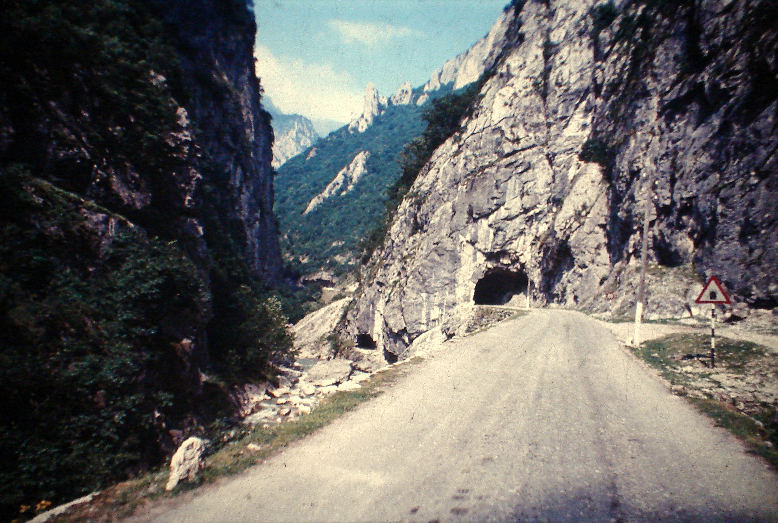 1972 RUGOVO SCHLUCHT